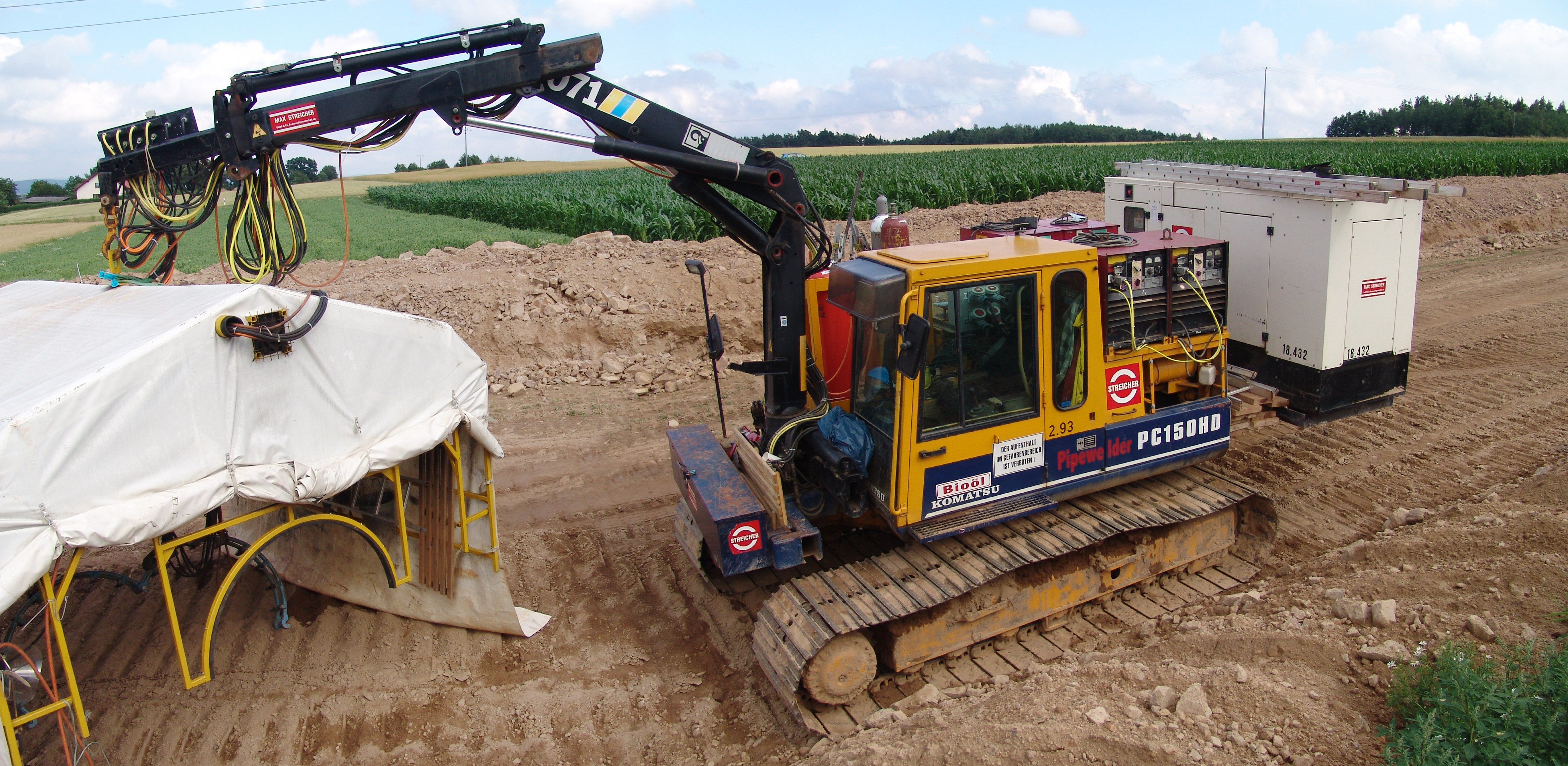 "Pipewelder" - Fahrzeug mit Ausrüstung zum Schweißen im Außenbereich z.B. beim Bau von Pipelines